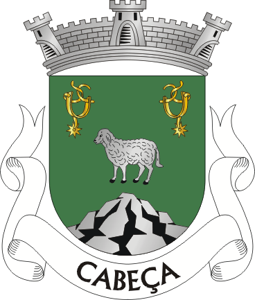 Brasão da Cabeça (concelho de Seia - Portugal)